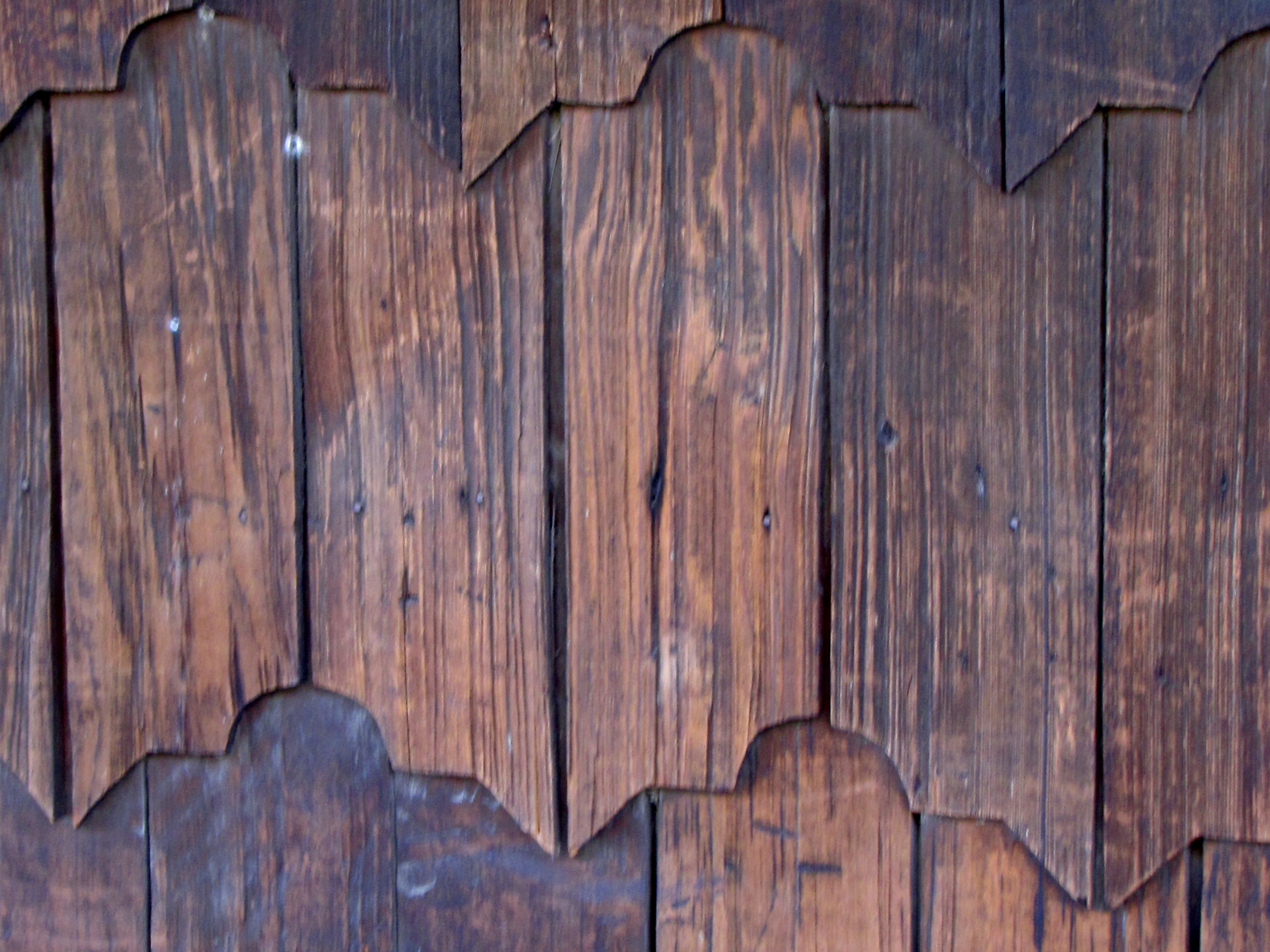 Tejuelas de alerce (Fitzroya cupressoides) de Casa Pastoral de la iglesia San Francisco de Castro, Chile.